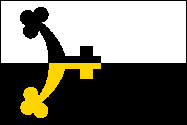 vlajka,Křižanov , okres Žďár nad Sázavou